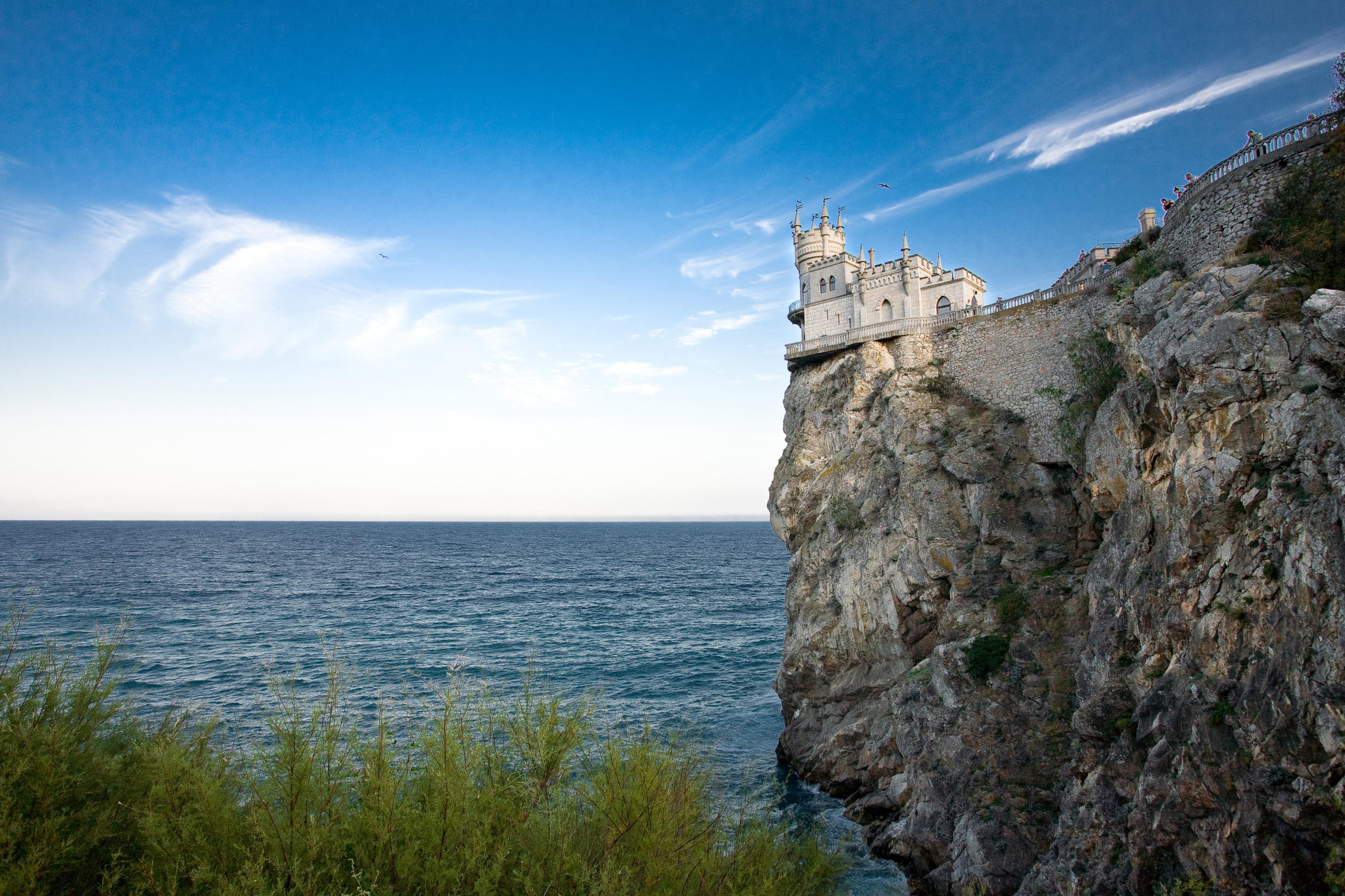 Гаспра, вул. Алупкінське шосе, 9